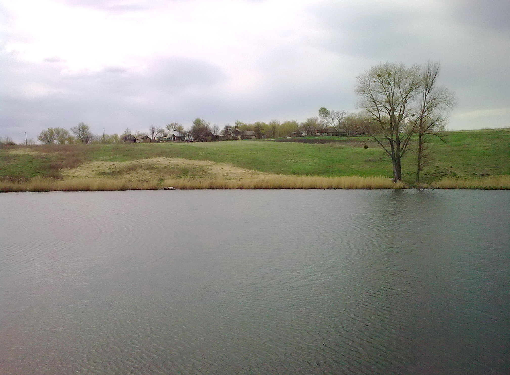 Вид на село со стороны Высокополья